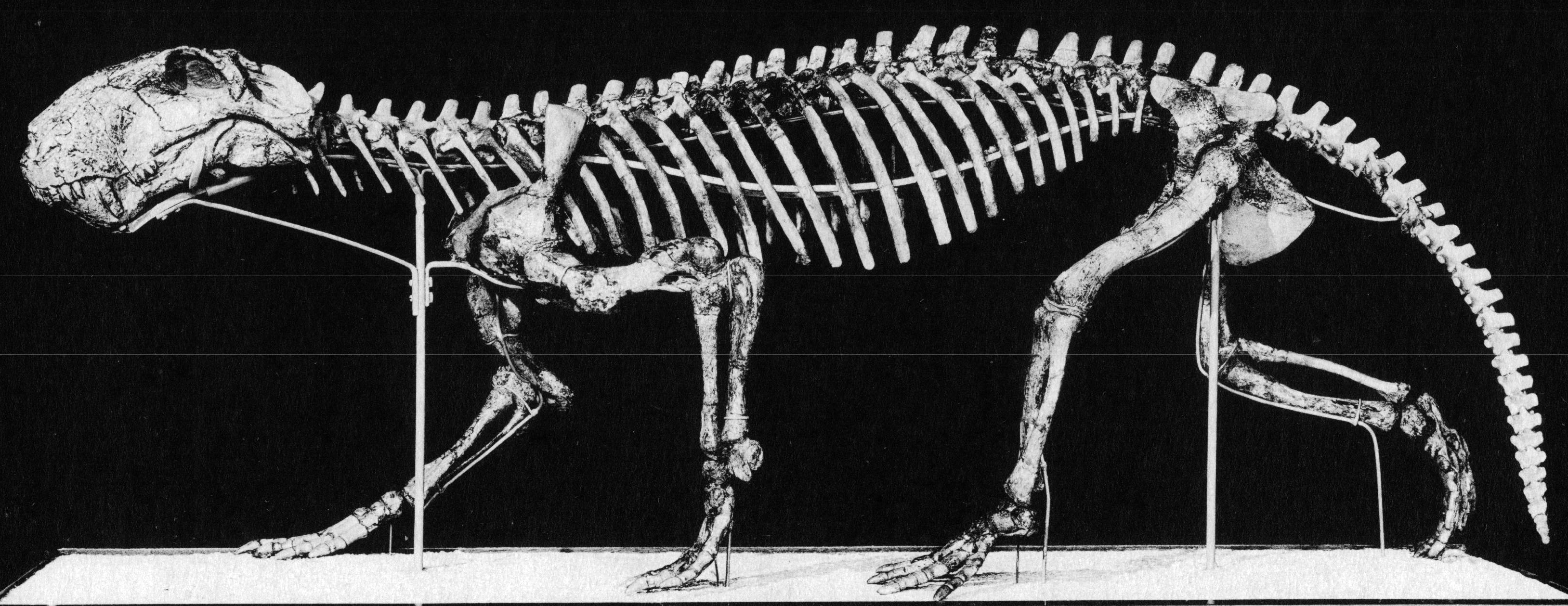 Lycaenops ornatus skeleton, specimen AMNH 2240